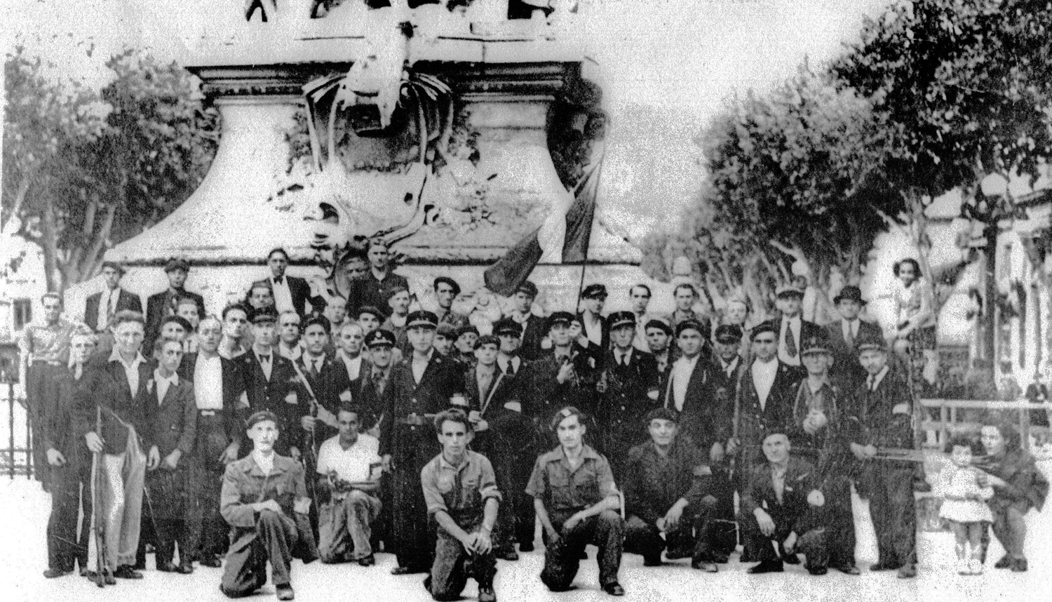 Groupe de FTP à la libération Place de l”horloge